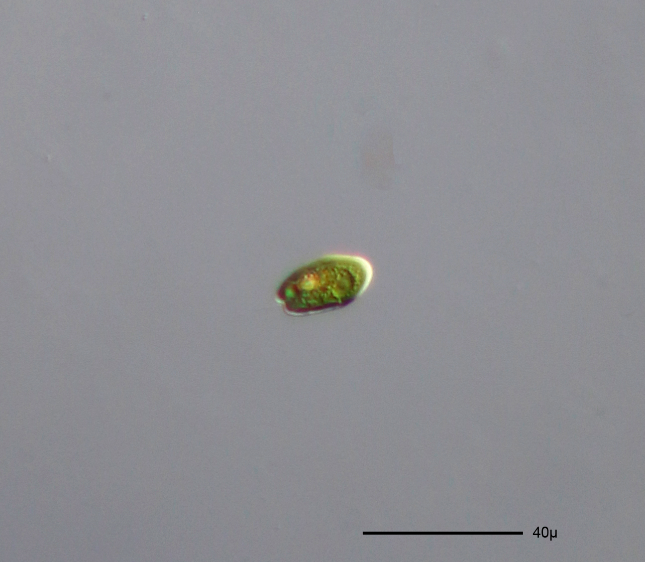 Cryptomonas platyuris - 160x